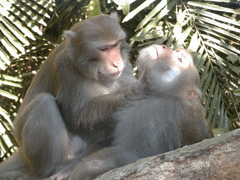 Un mâle macaque de Formose, Macaca cyclopis en plein toilettage. Photographie de Minna J. Hsu avec son aimable autorisation.